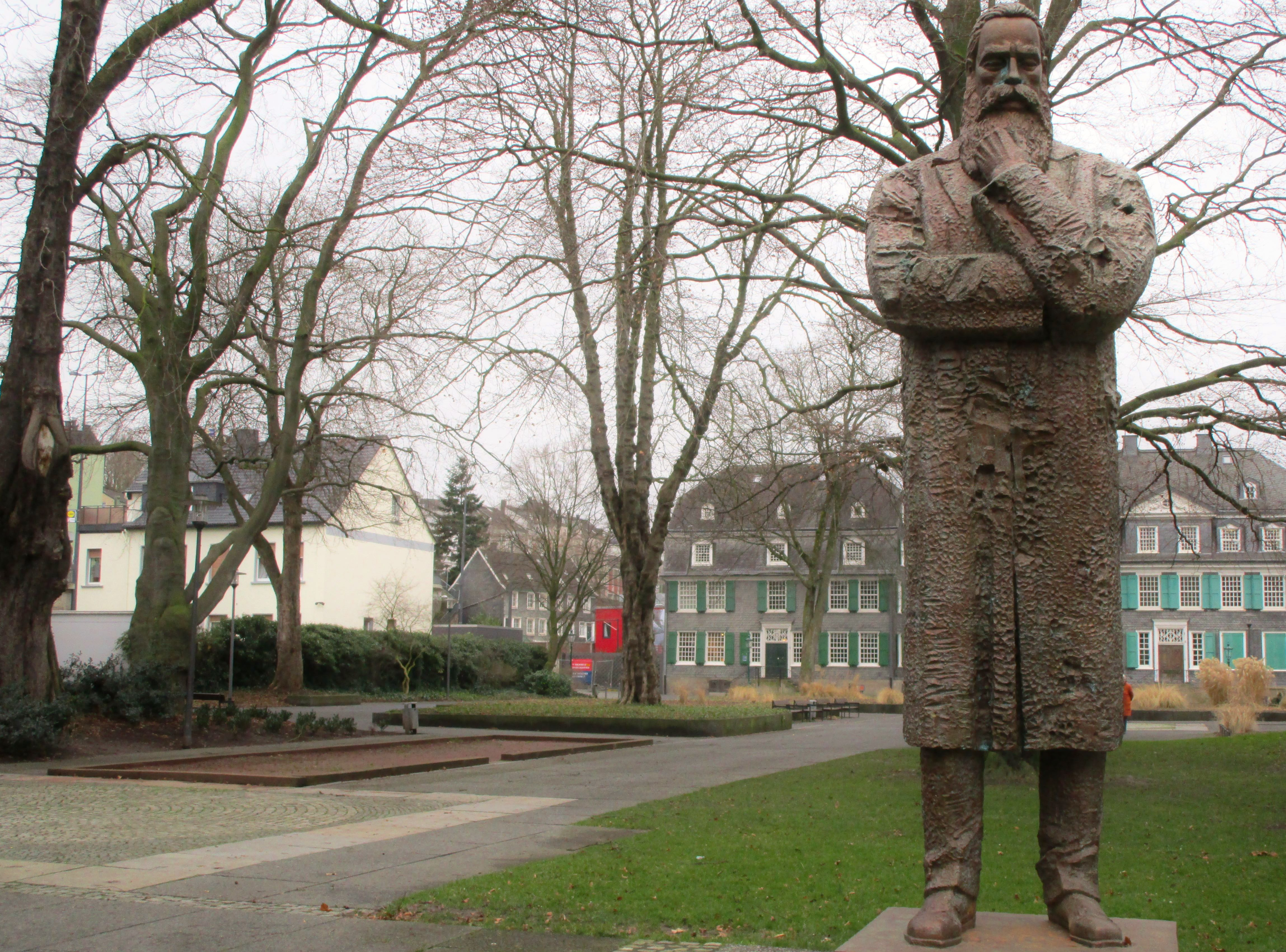 Fr.Engels Geburtshaus, Wuppertal-Barmen, Geburtshaus mit Statue